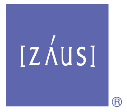 ザウス株式会社のロゴです。